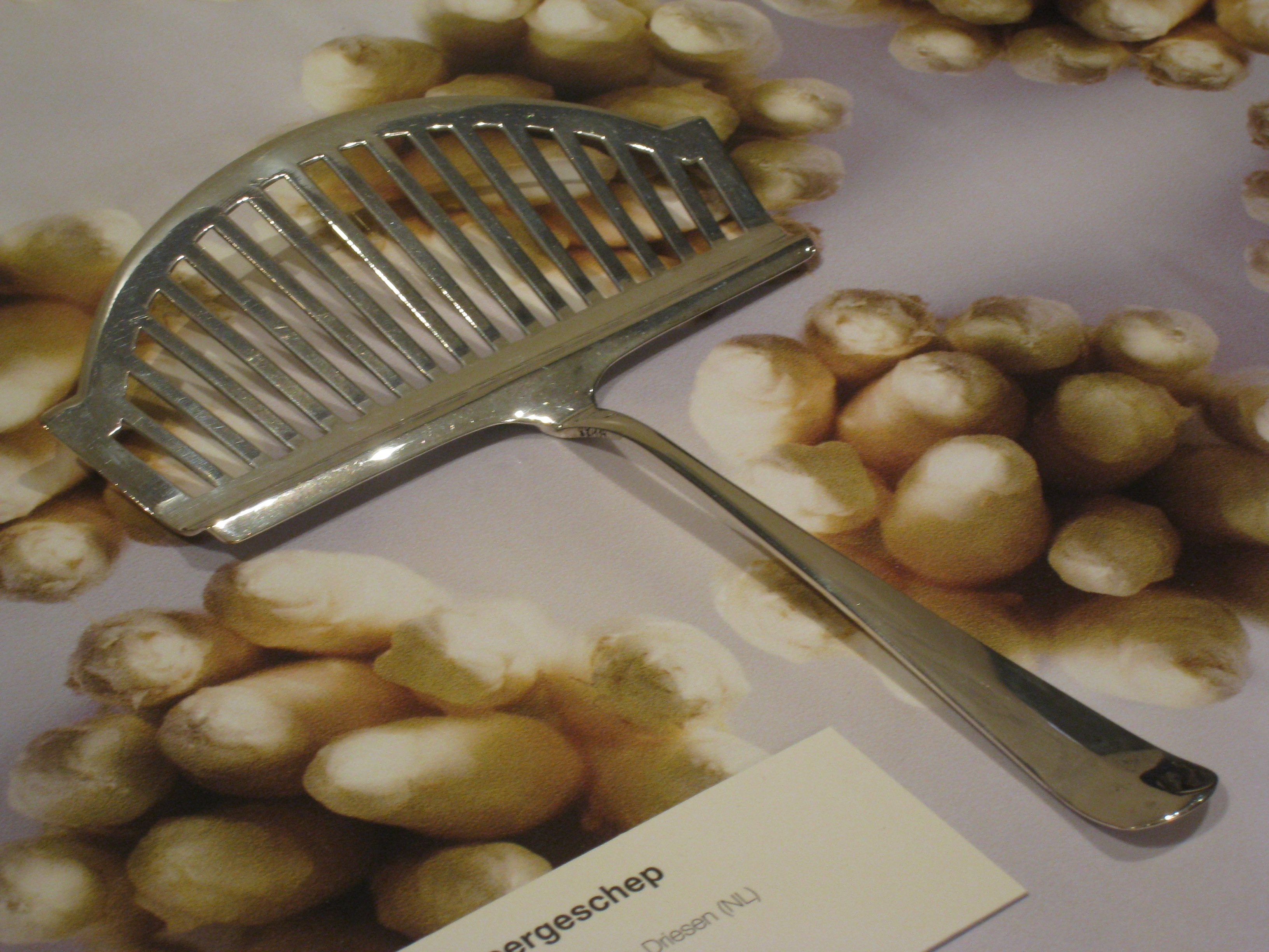 Aspergeschep